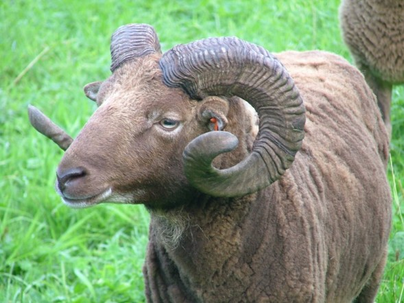 A Castlemilk Moorit ram